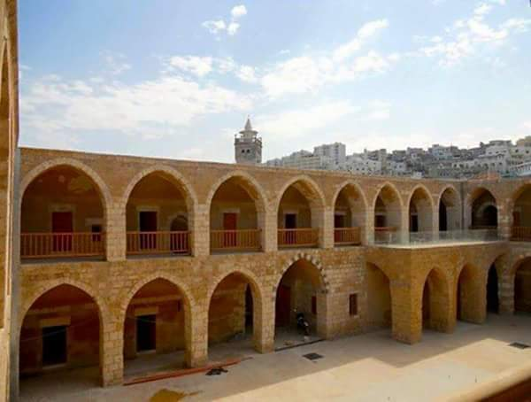 خان العسكر